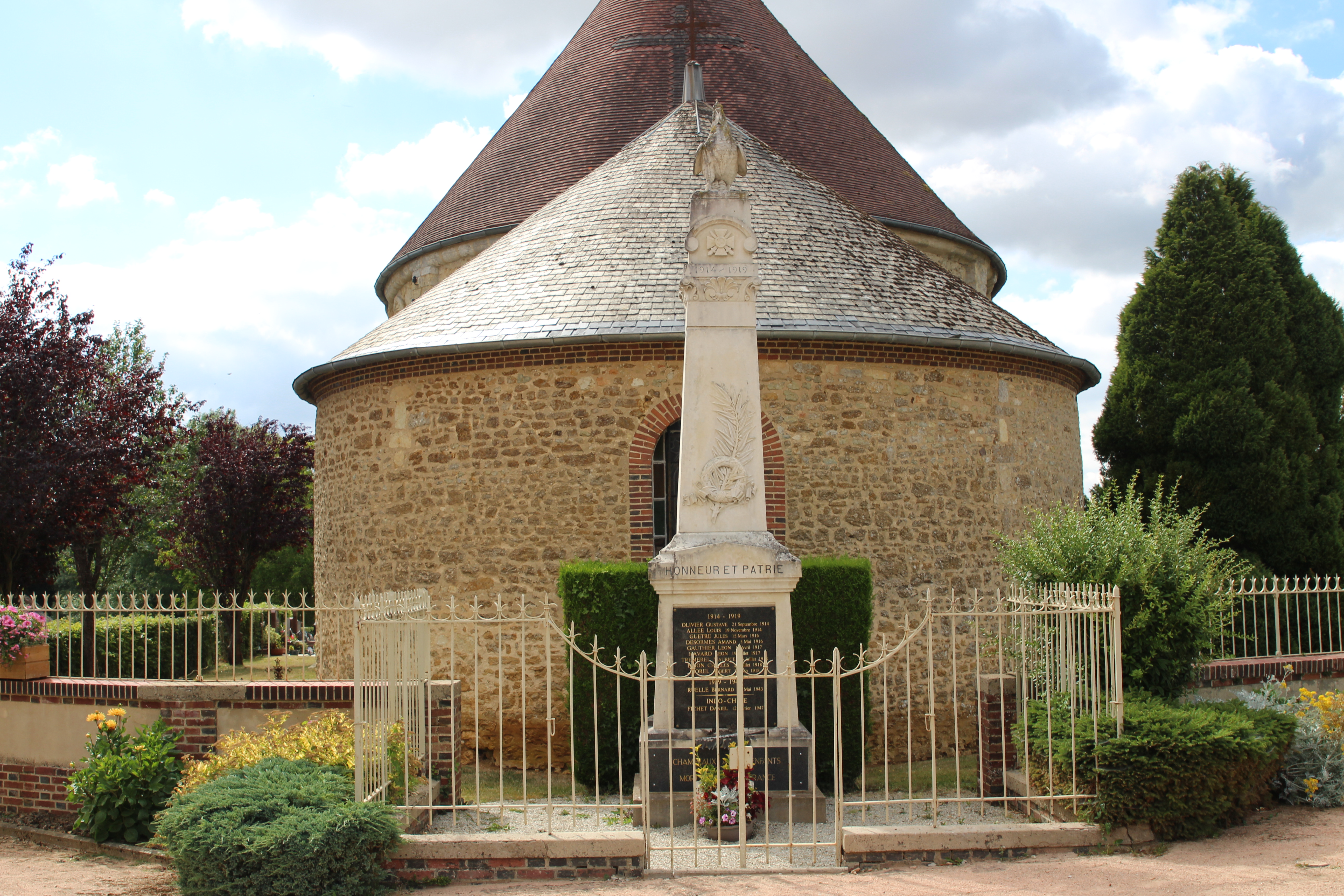 Champeaux-sur-Sarthe, Orne